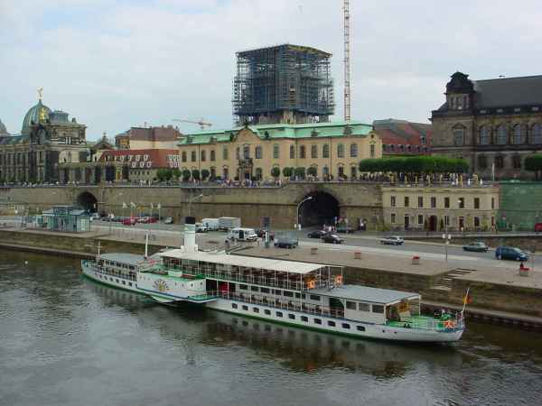 Dresden, Frauenkirche und Brühlsche Terrassen; fotografiert im Juli 2003.